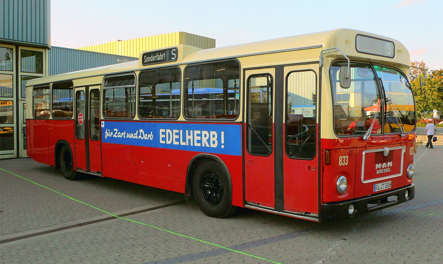 1972 MAN SL 192 (Wagen 833) der infra fürth verkehr gmbh